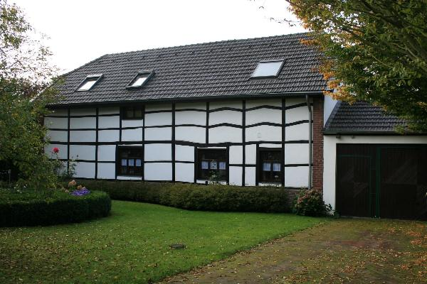 Fachwerkhaus in Wegberg-Gerichhausen